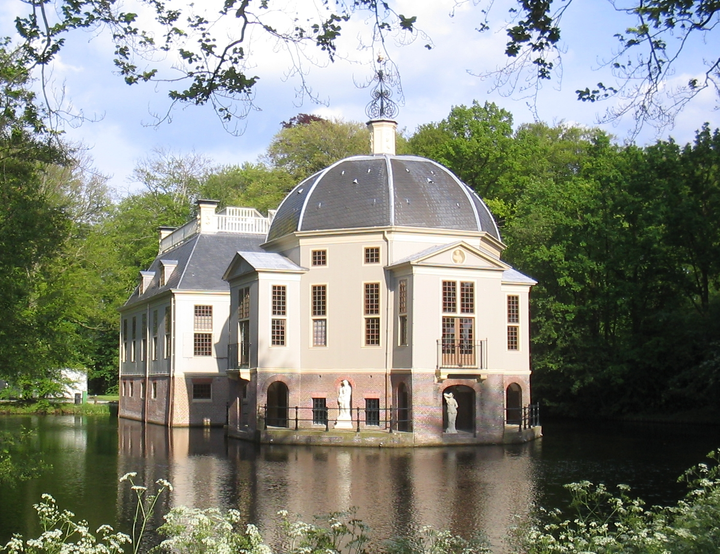 huis de Trompenburgh `s-Graveland